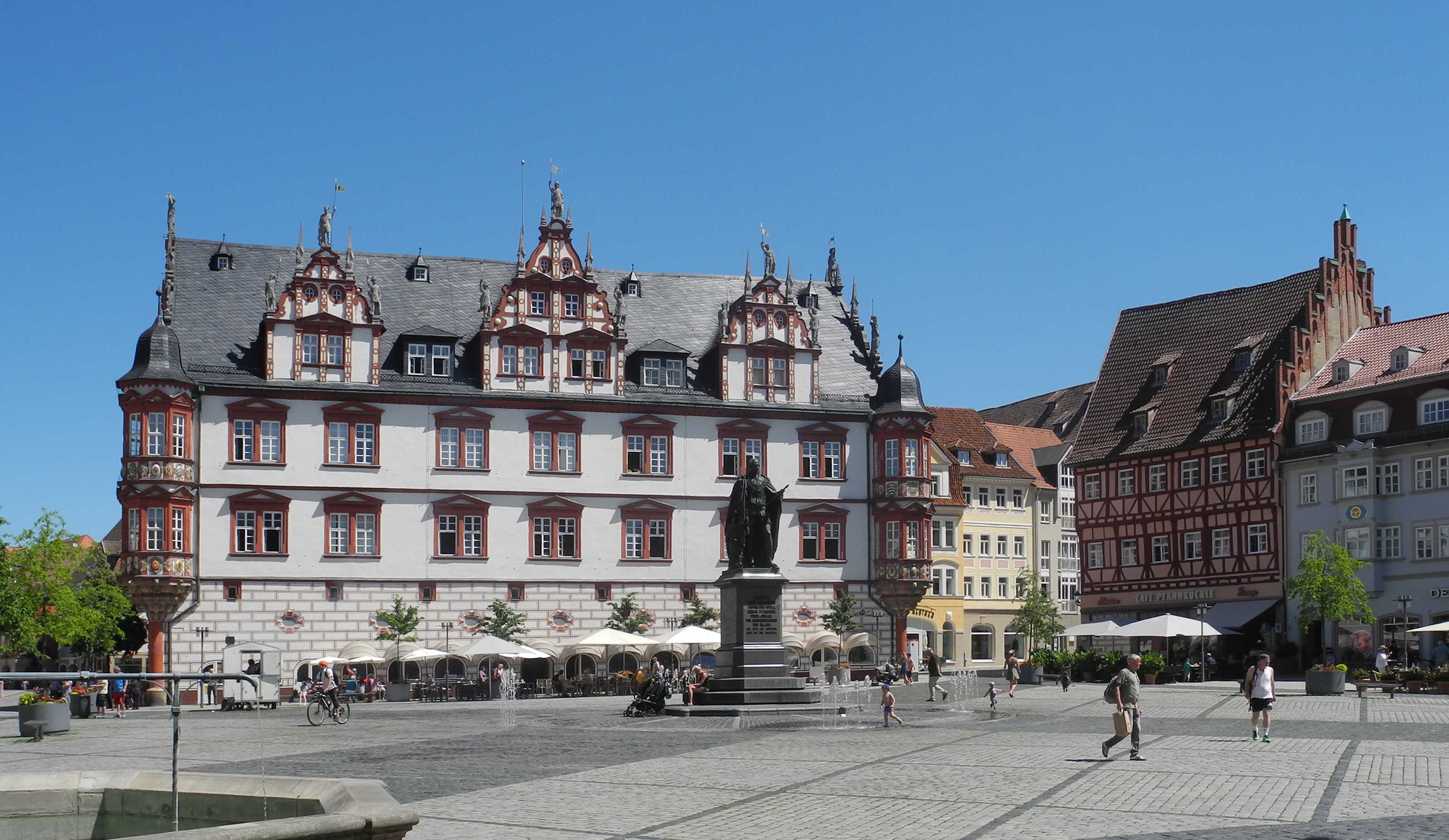 Coburg – Stadthaus am Marktplatz, ehem. Kanzleigebäude